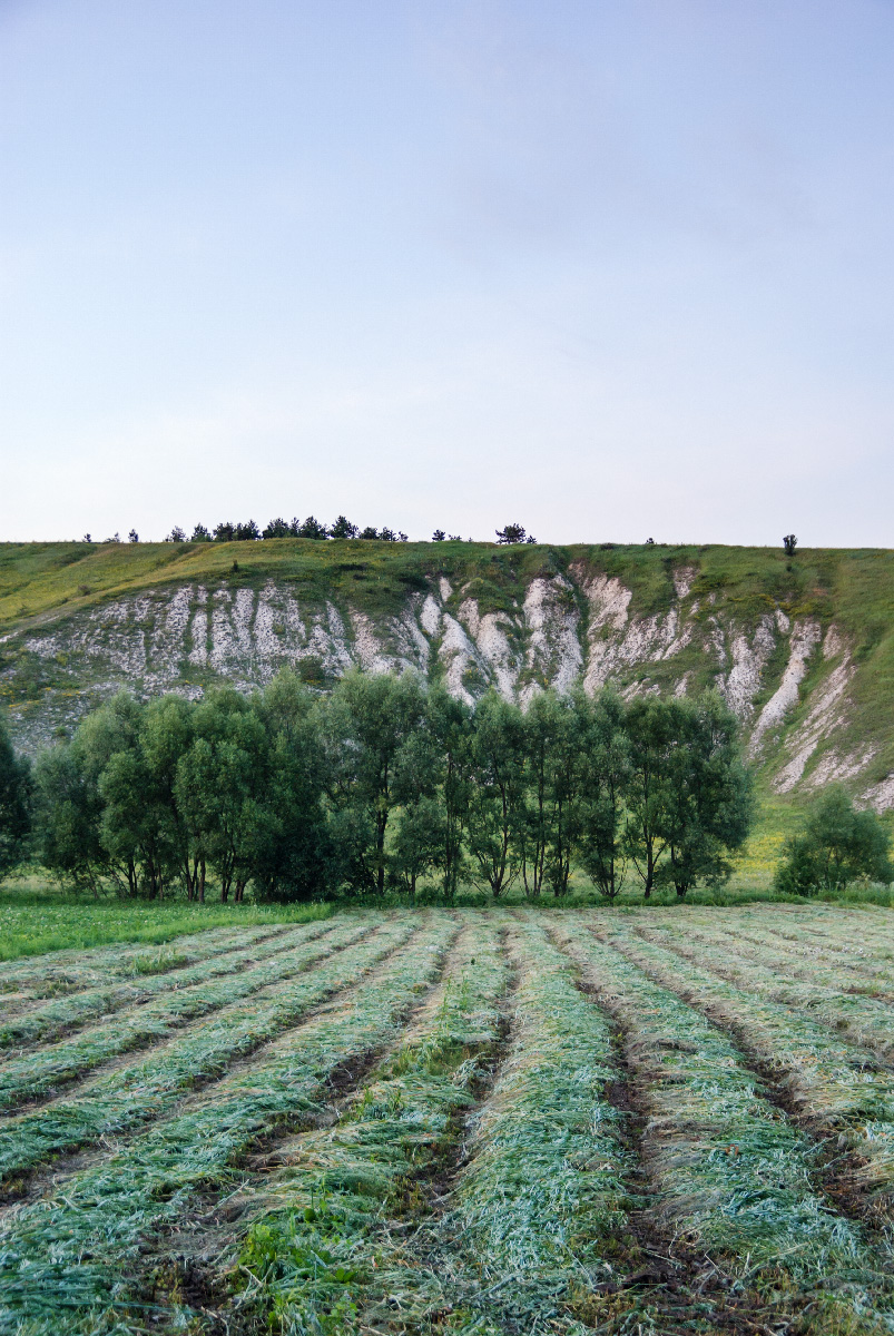 Яр «Жаб'як», Збаразький район, с. Дзвиняча, старий яр